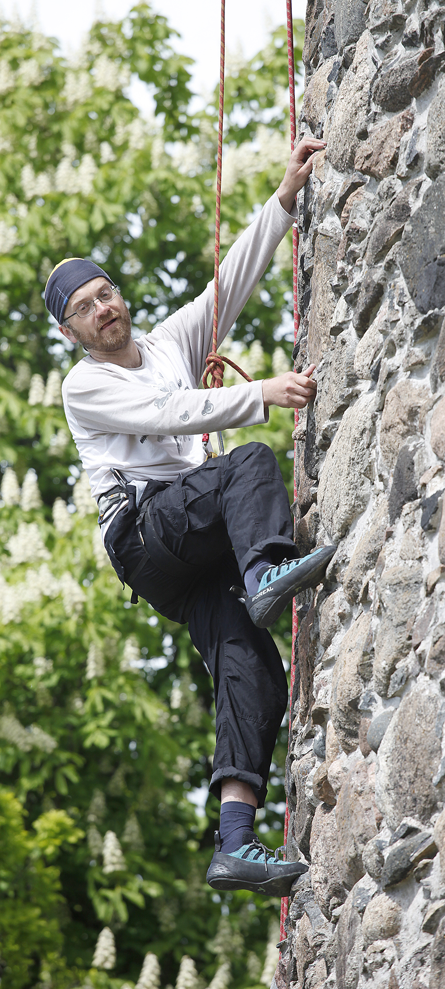 Priit Simson